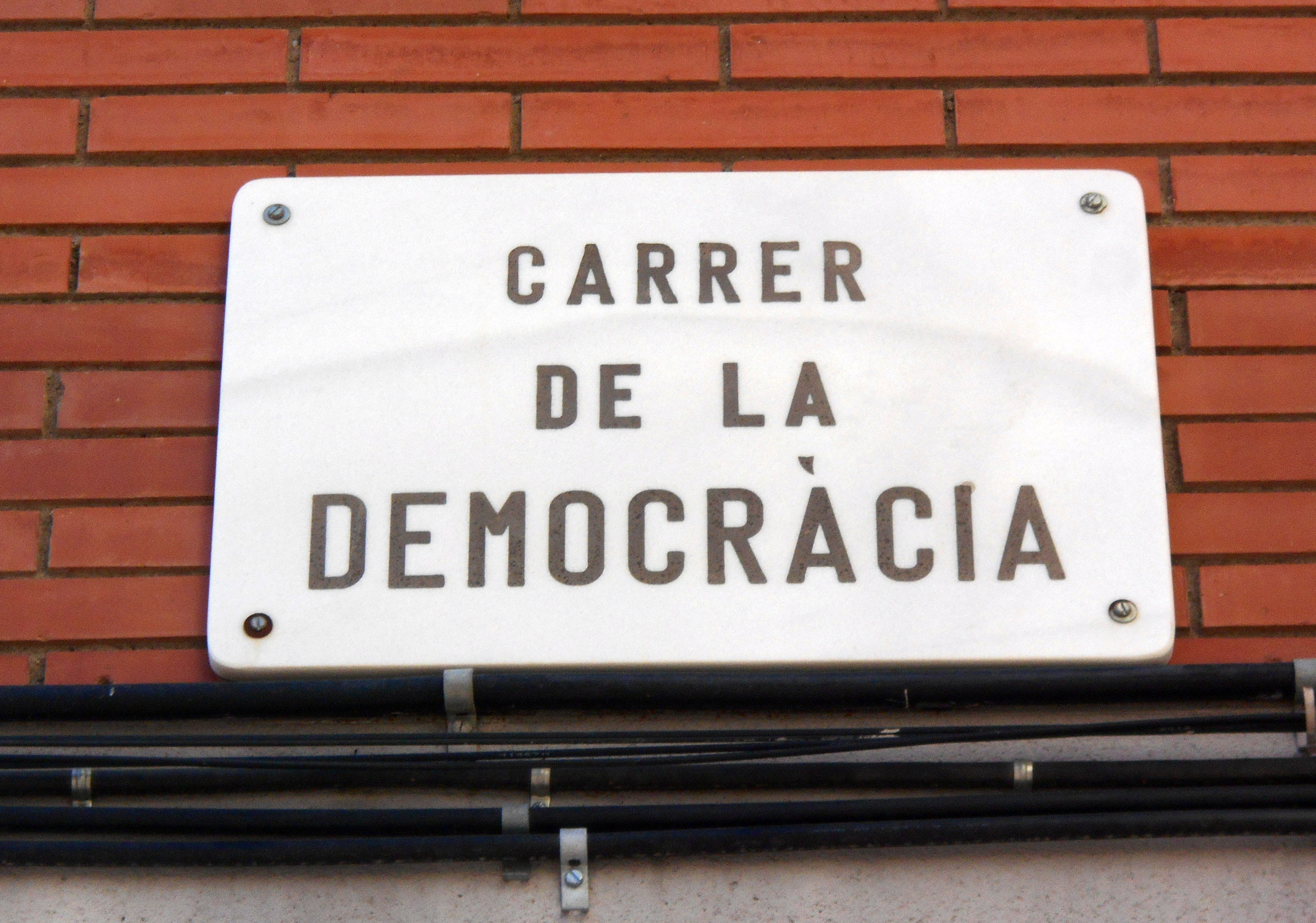 Calle de la Democracia.